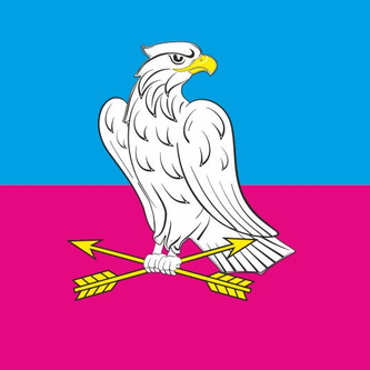 Прапор Перещепиного